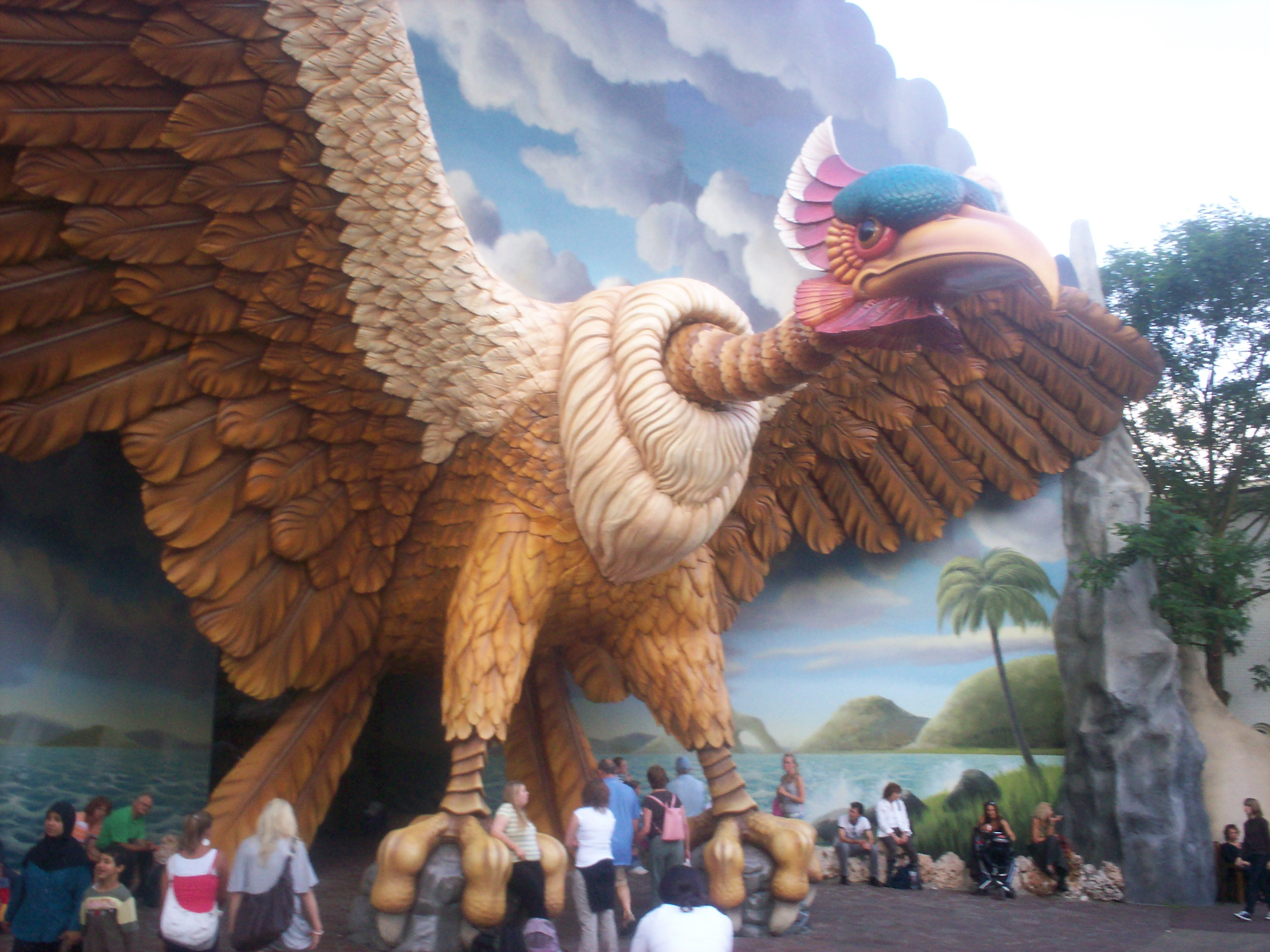 Entree Vogel Rok